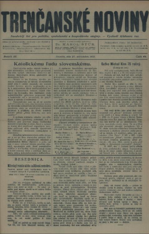 Titulný list týždenníka Trenčanské noviny.